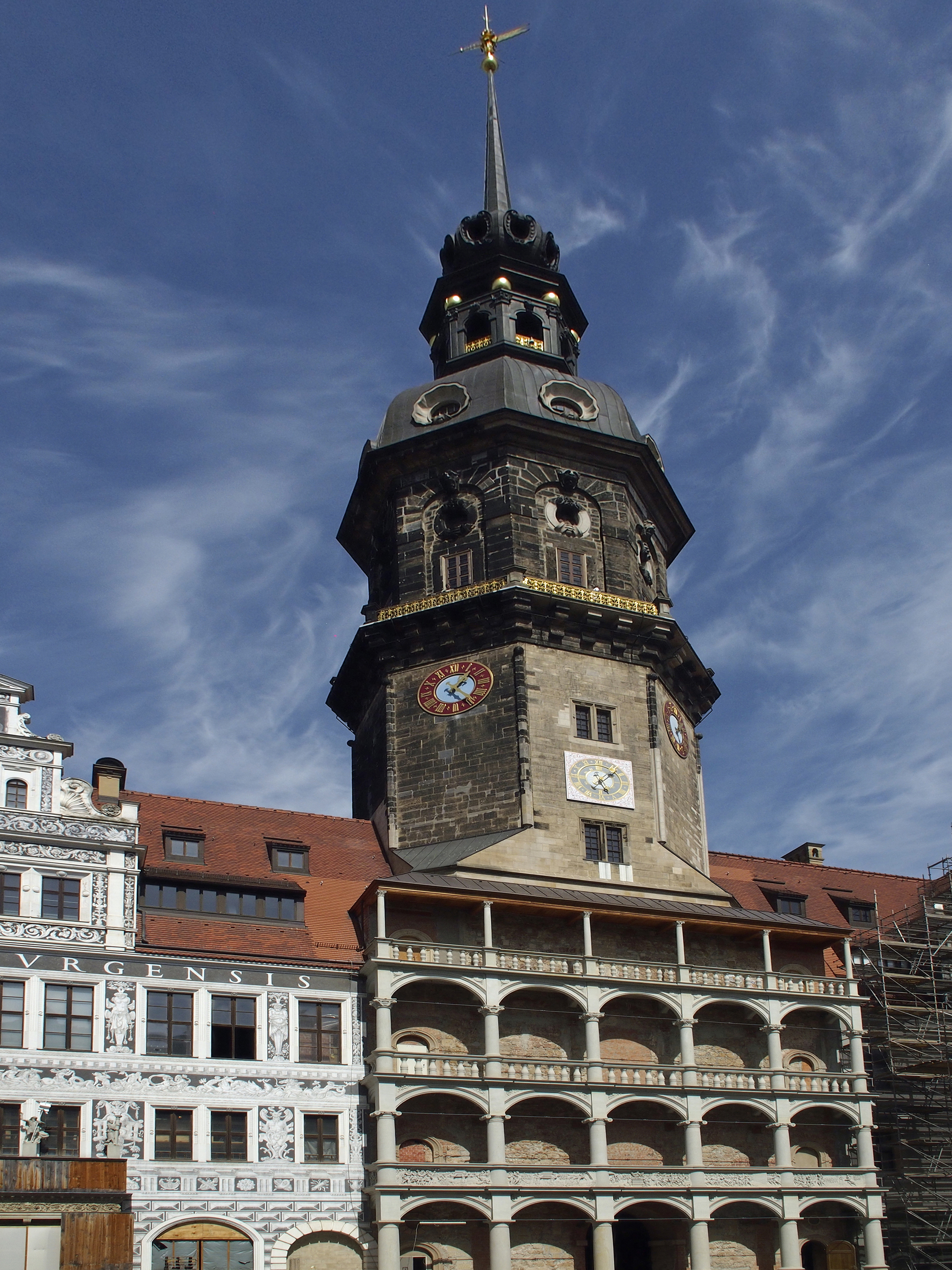 Hausmannsturm, Sicht vom Innenhof des Dresdner Schlosses